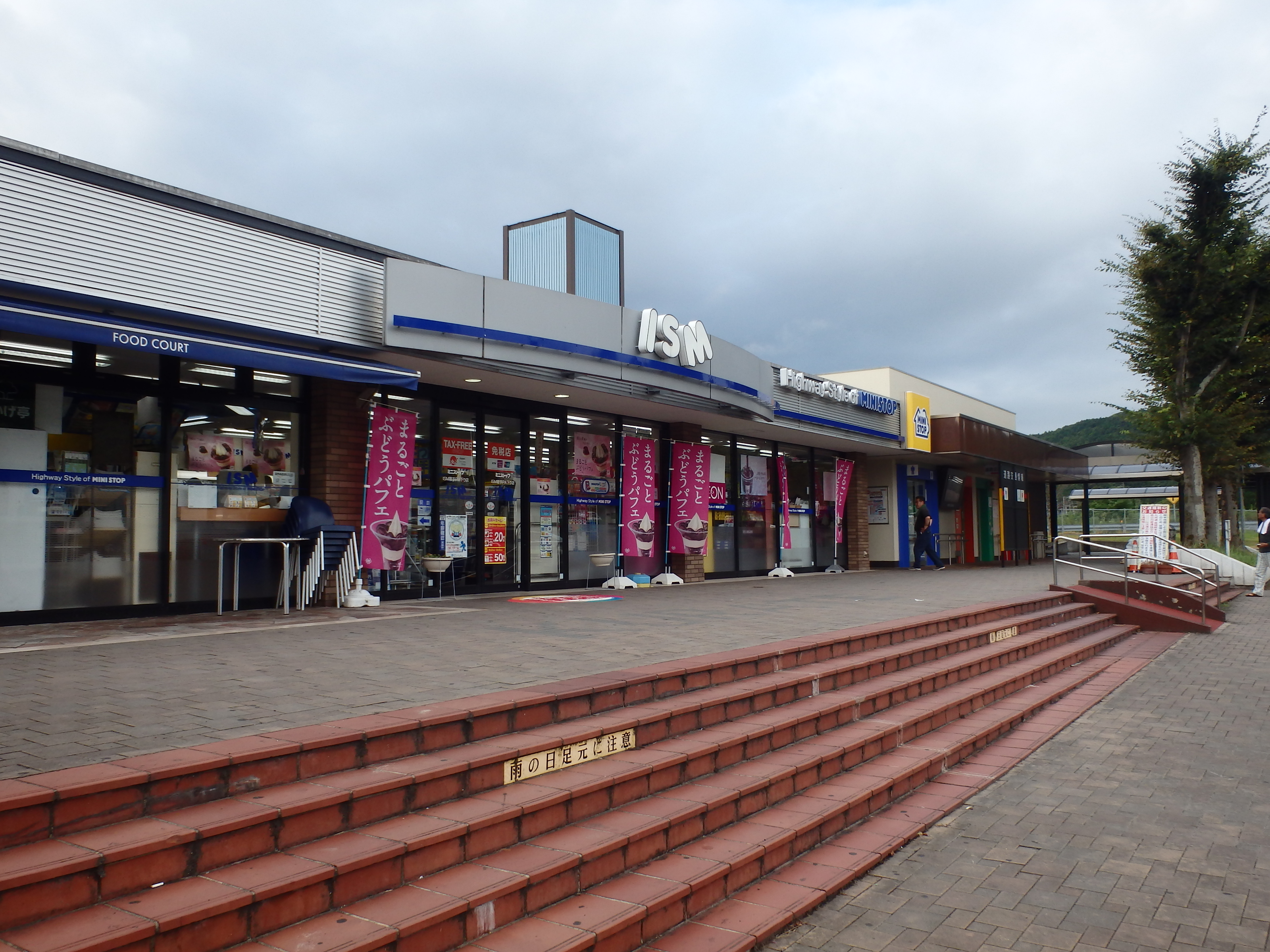 鞍手パーキングエリア（下り）